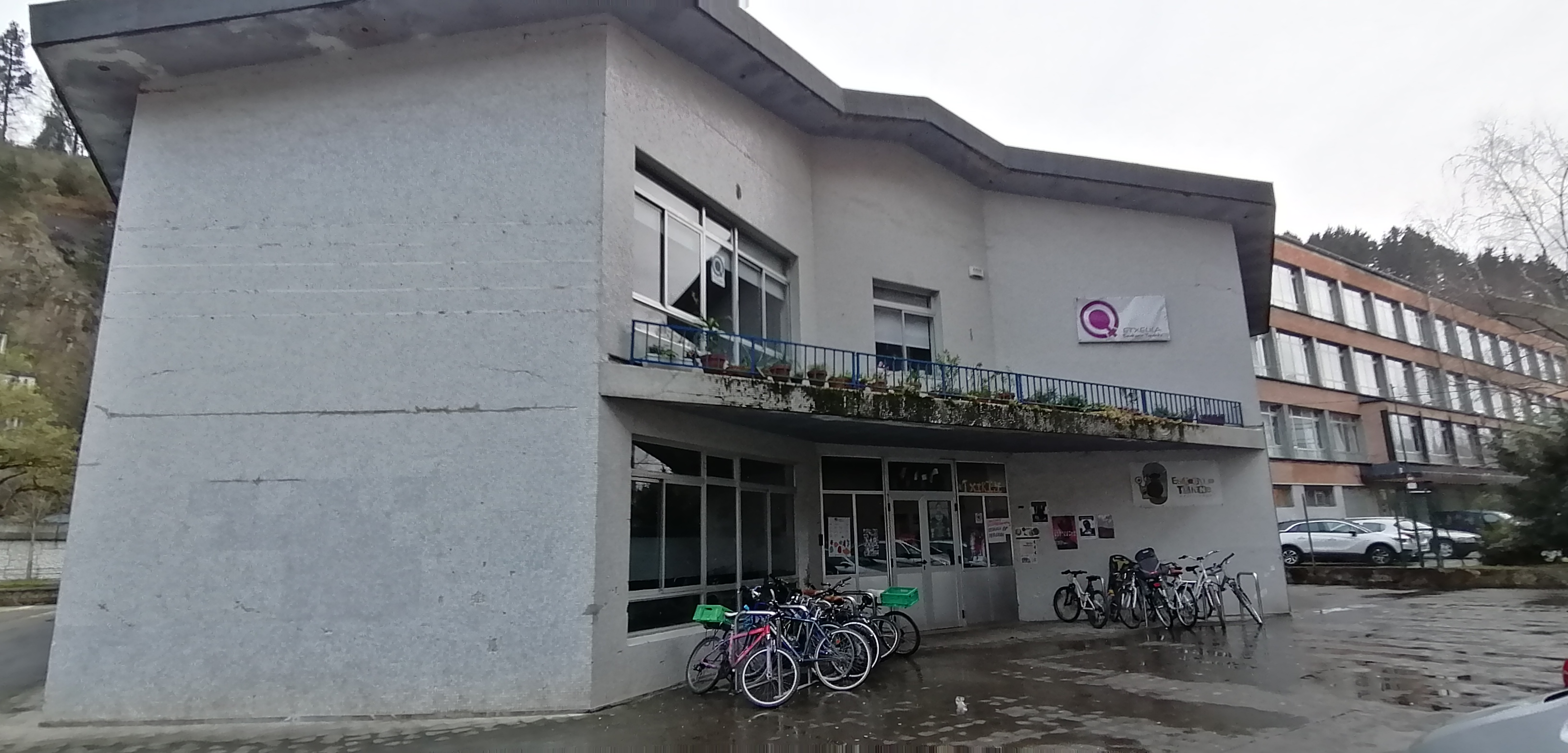 Etxelila Ondarroan